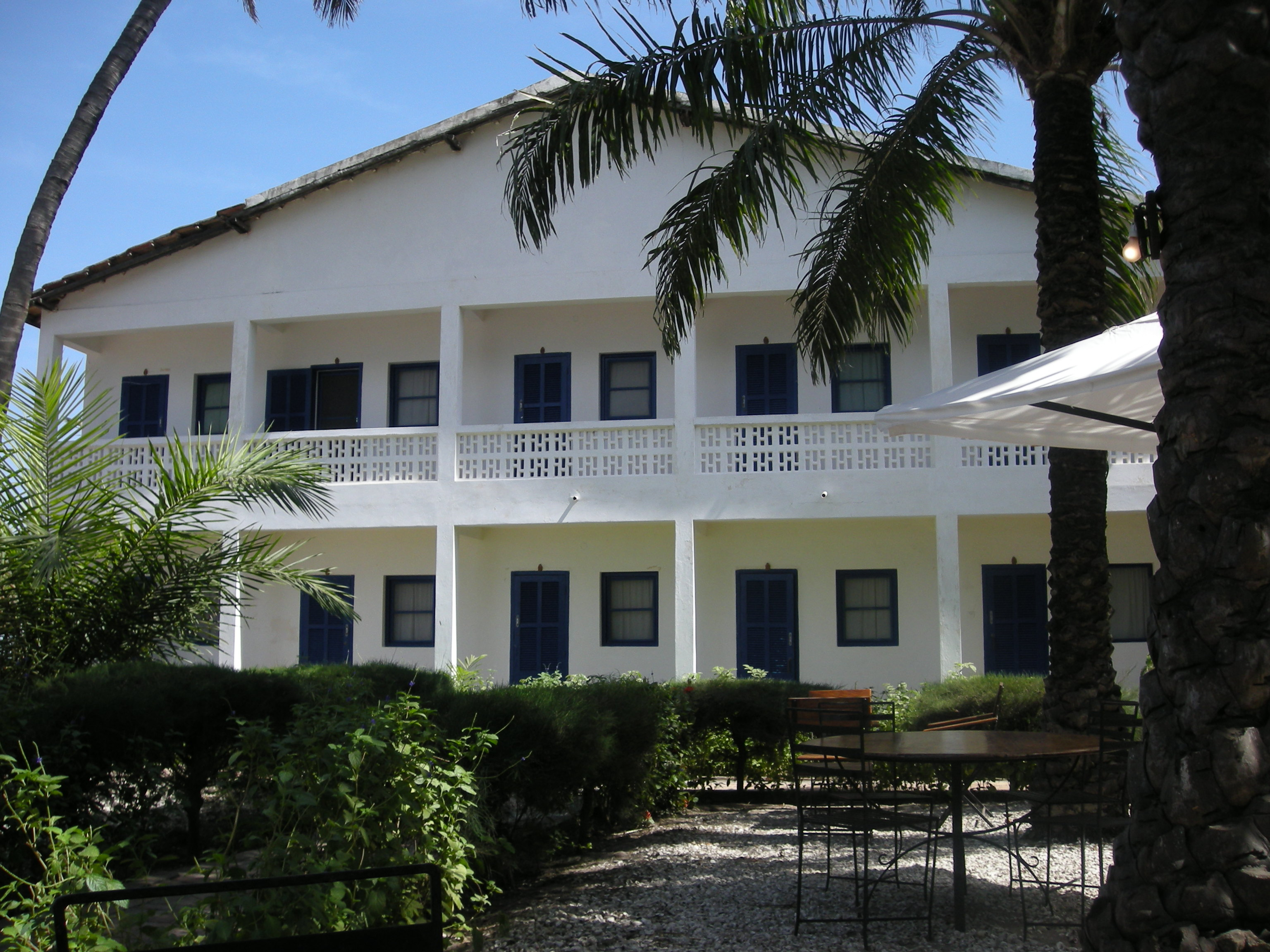 Ancienne mission transformée en hôtel sur l'île de Carabane (Casamance, Sénégal)